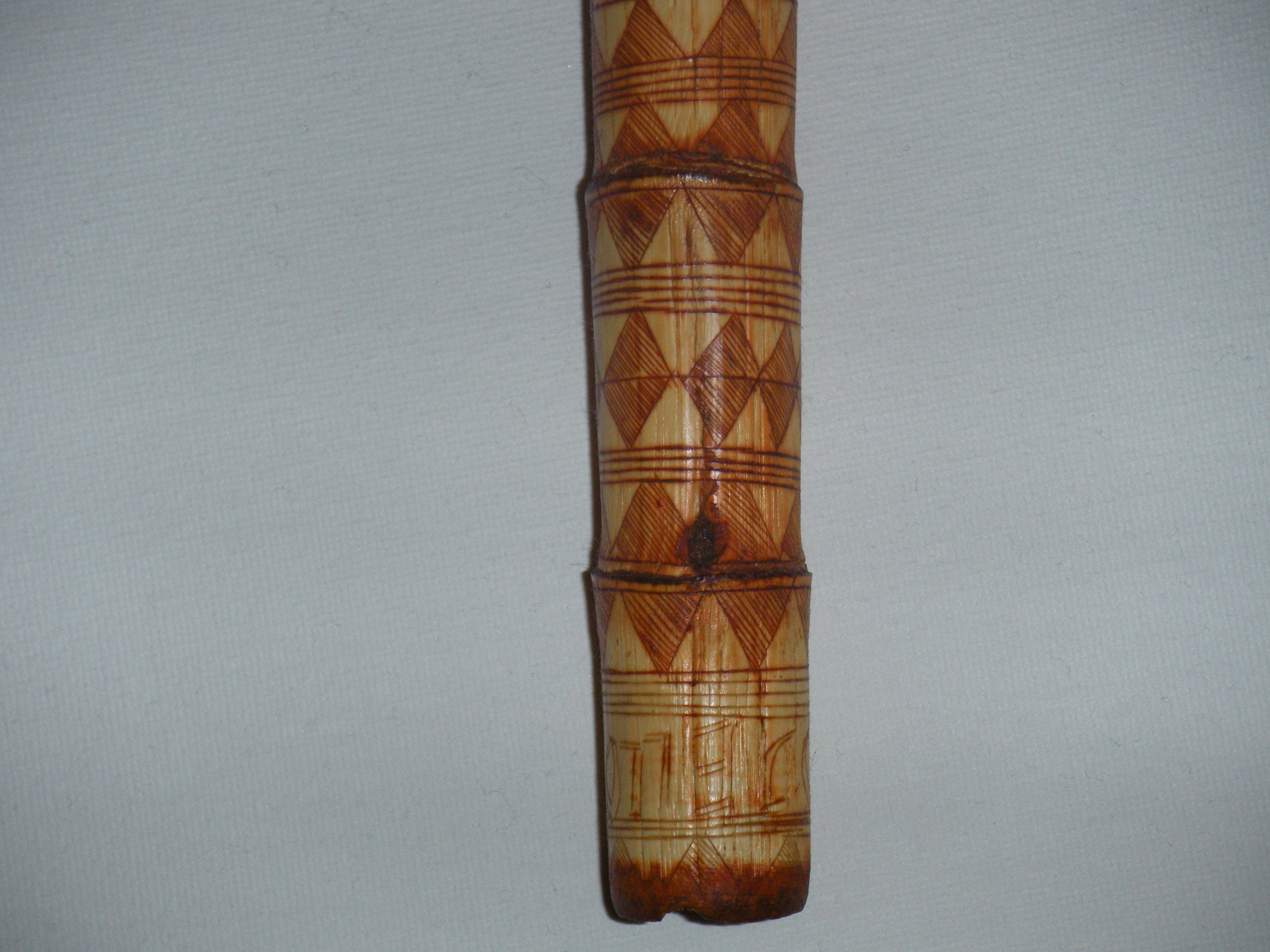 Flûte oblique Taghanimt chaouie des Aurès avec biseau en anneau et vue sur la signature de son créateur